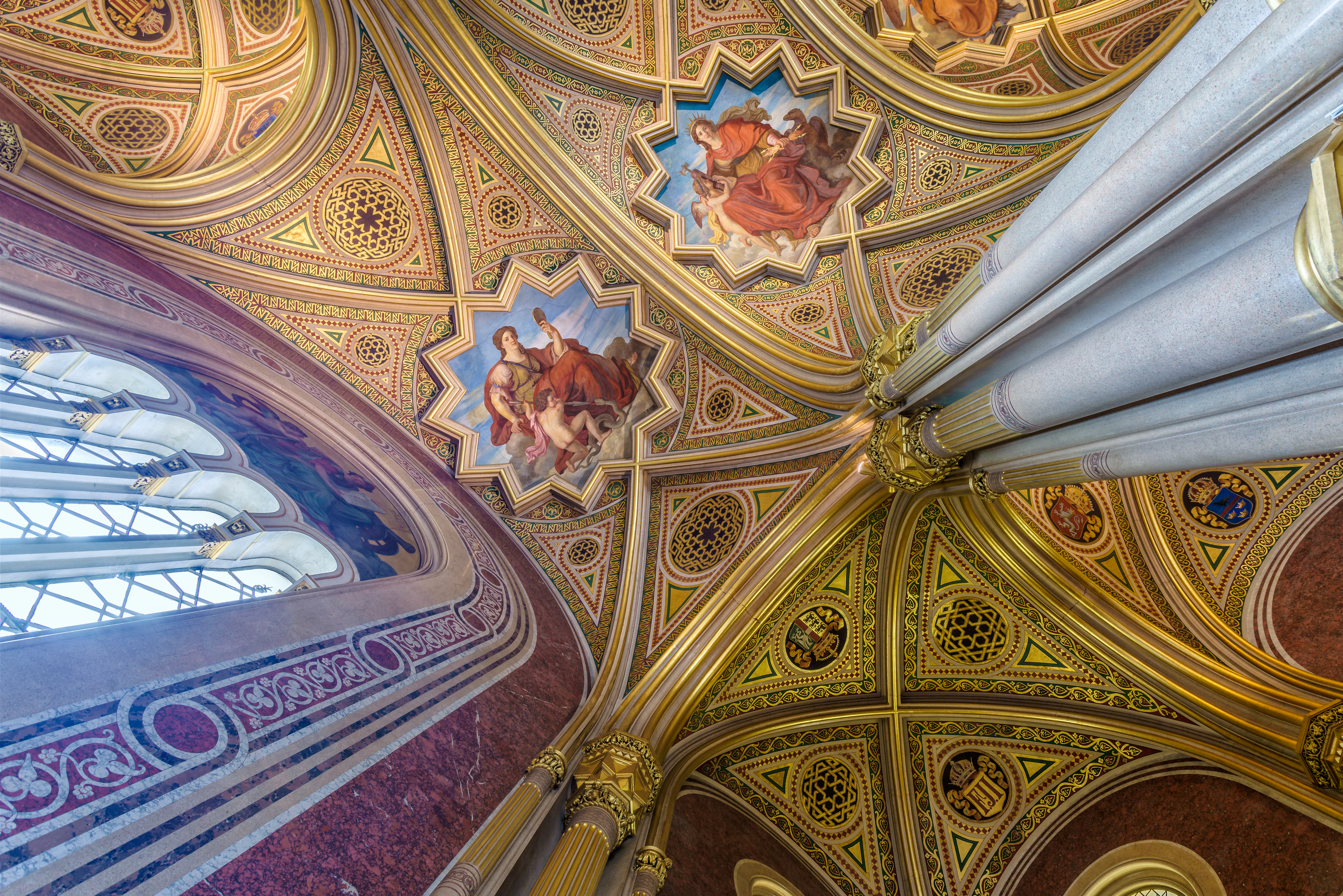 Heeresgeschichtliches Museum Wien Stiegenhaus Deckenfresko